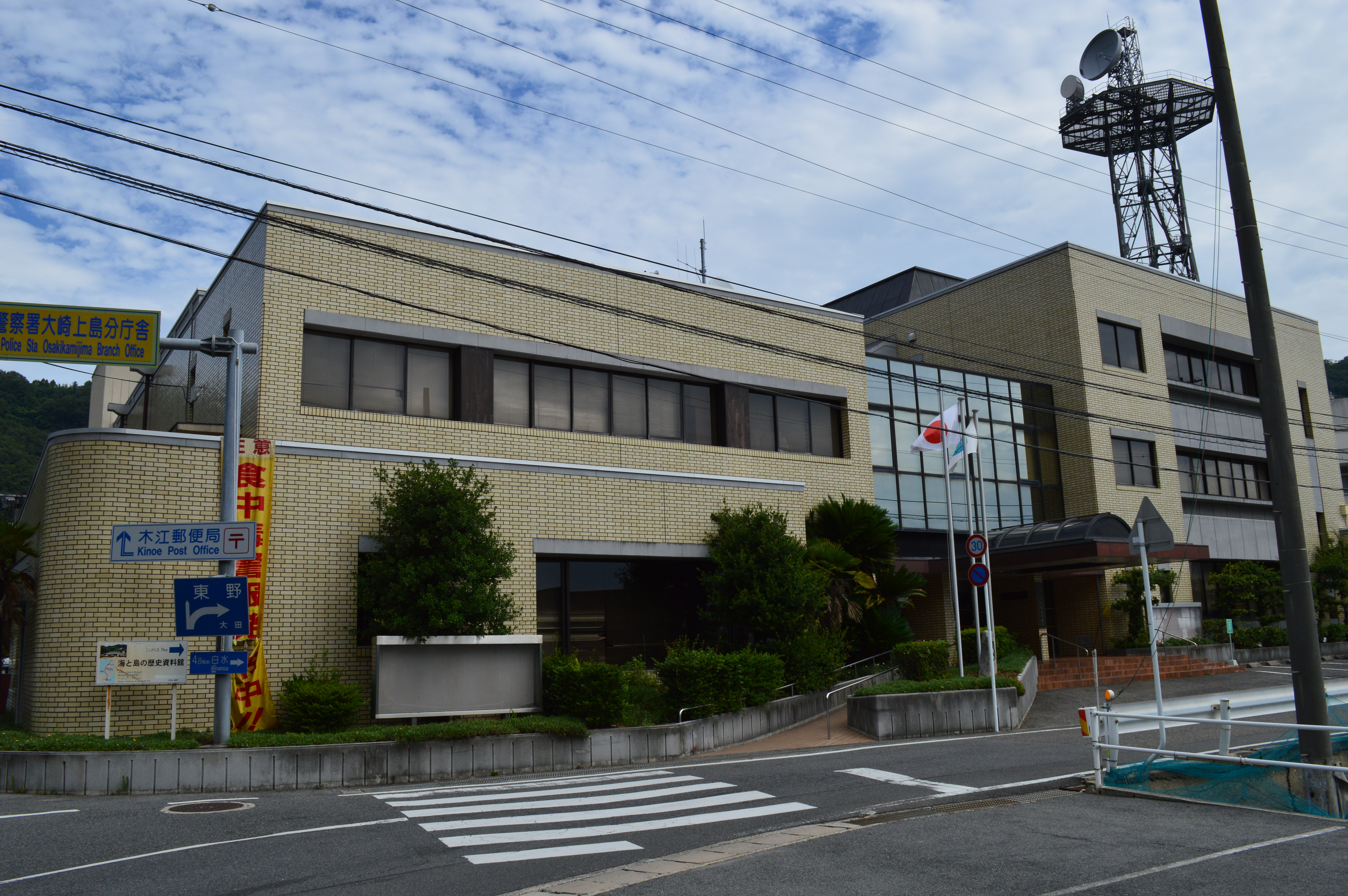 広島県豊田郡大崎上島町の町役場木江支所